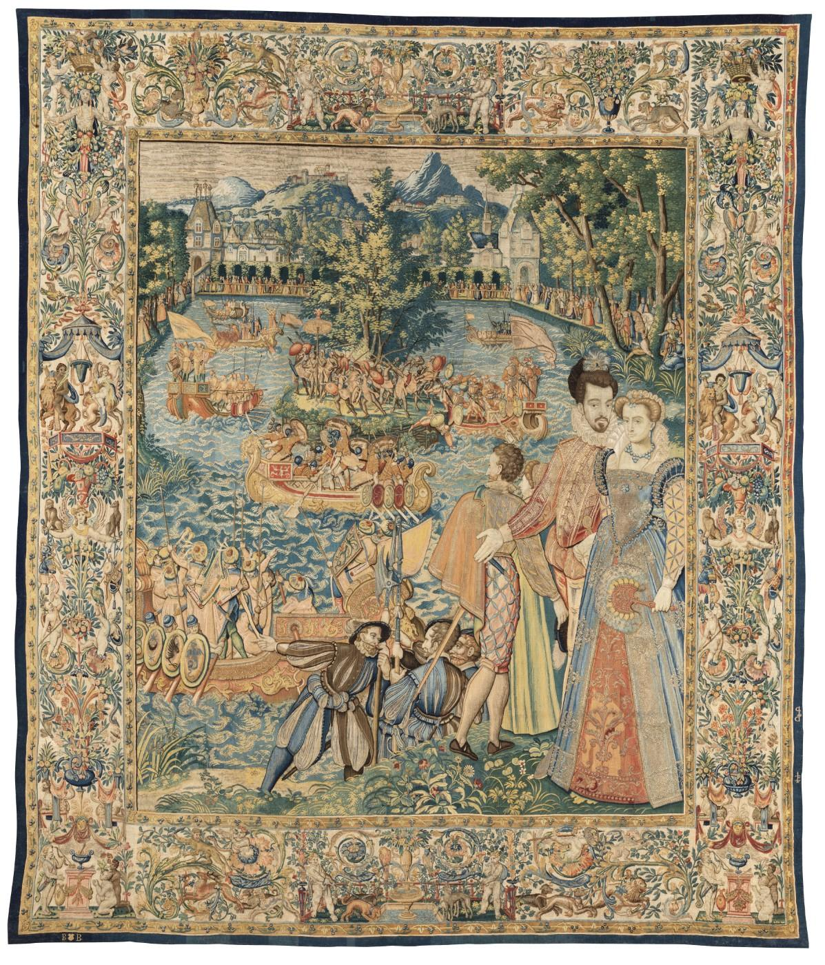 Tapisserie dite de « Fontainebleau », appartenant à la série des « tapisseries des Valois » conservées au musée des Offices de Florence. Au premier plan, à droite, figurent le roi Henri III et la reine Louise de Lorraine.